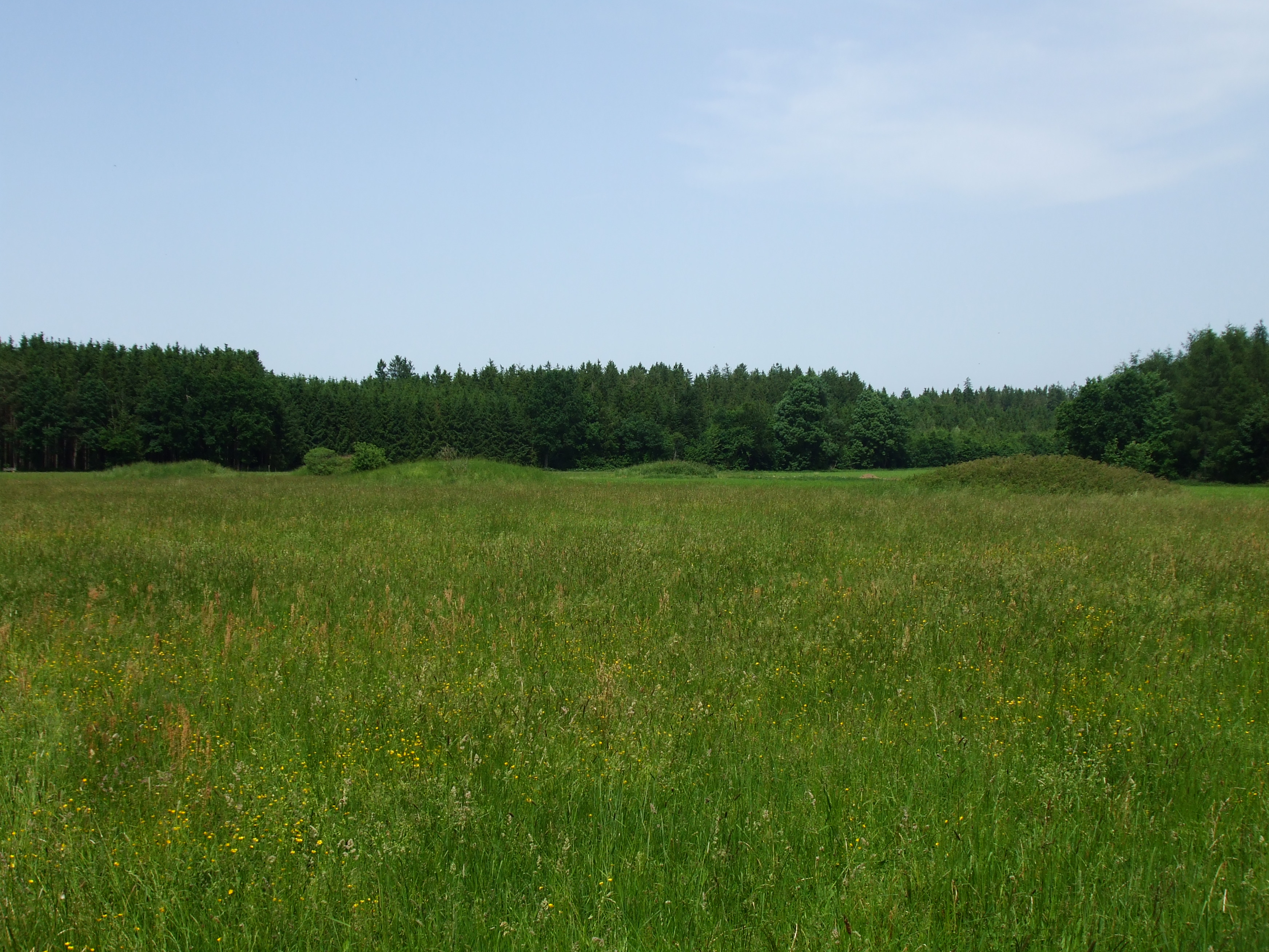 Keltengräber südöstlich von Pürgen, Landkreis Landsberg am Lech (Bayern)